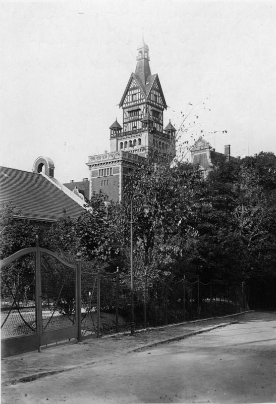 Potsdam, Brauhausberg, Reichsarchiv Scherl Bilderdienst Ehemalige Kriegsschule, jetziges Reichsarchiv auf dem Brauhausberg in Potsdam [1929] 33959-29 [Potsdam, Brauhausberg.- Reichsarchiv / Heeresarchiv (ehemalige Kriegsschule)]